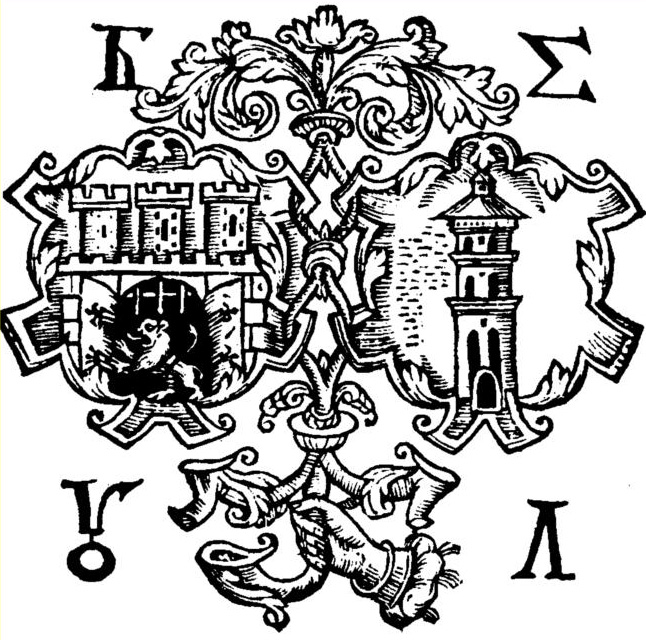 Типографская печать православного Львовского братства